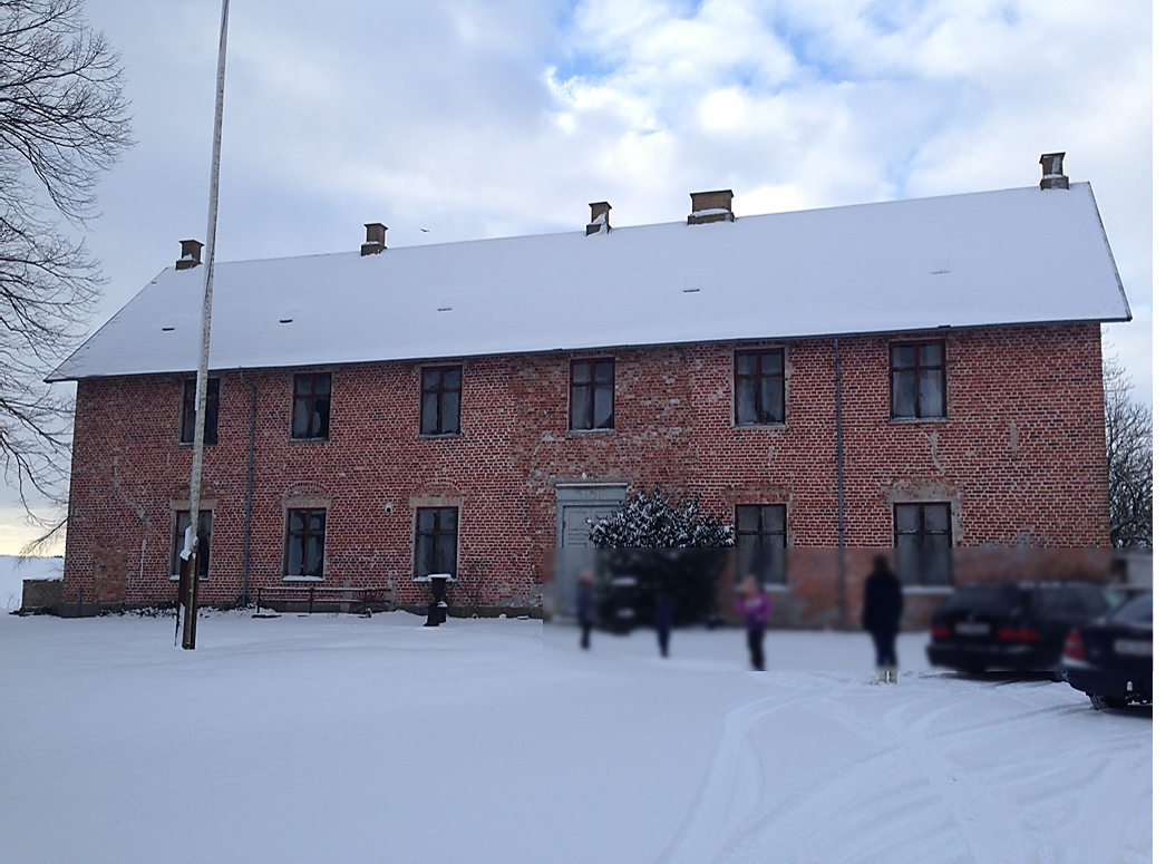 Trudsholm gods